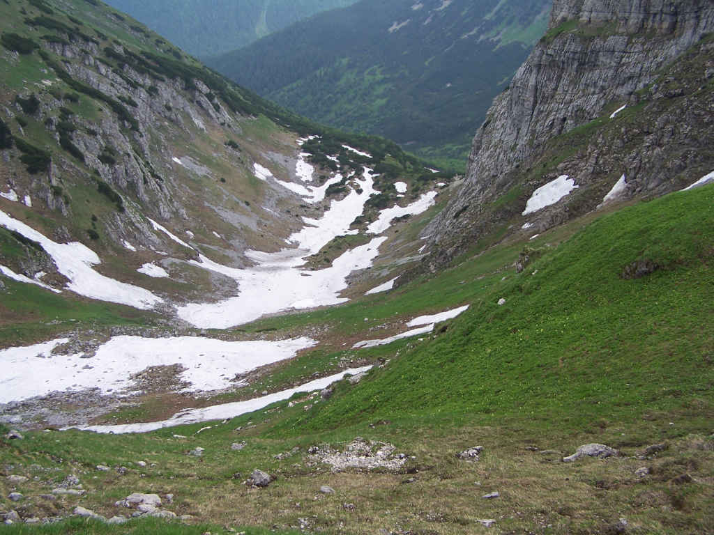 Świstówka Liptowska (Tatra Mountains, Dolina Tomanowa Liptowska)